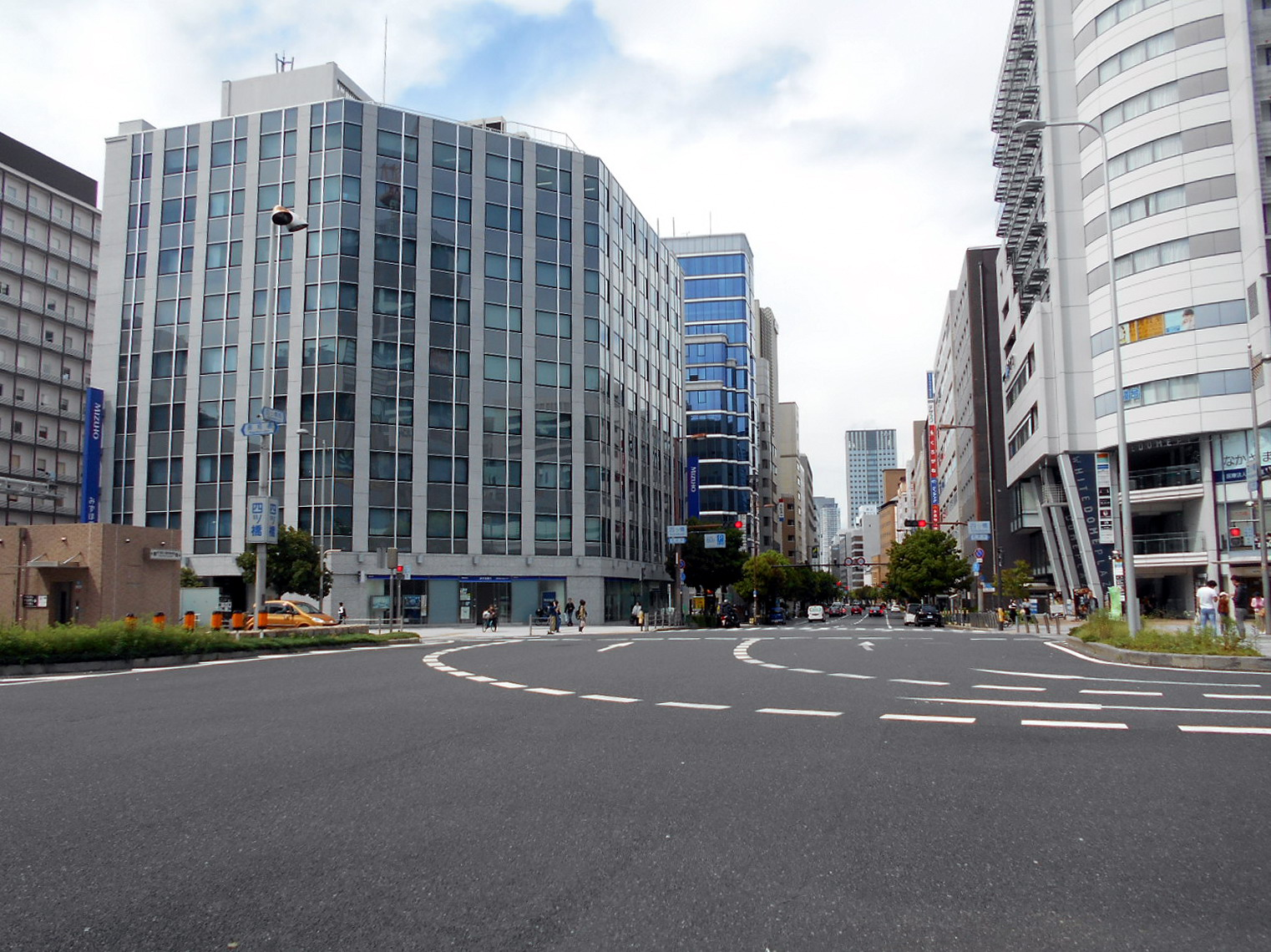 四ツ橋交差点（2018年5月撮影）